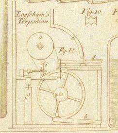 Patentausscnitt